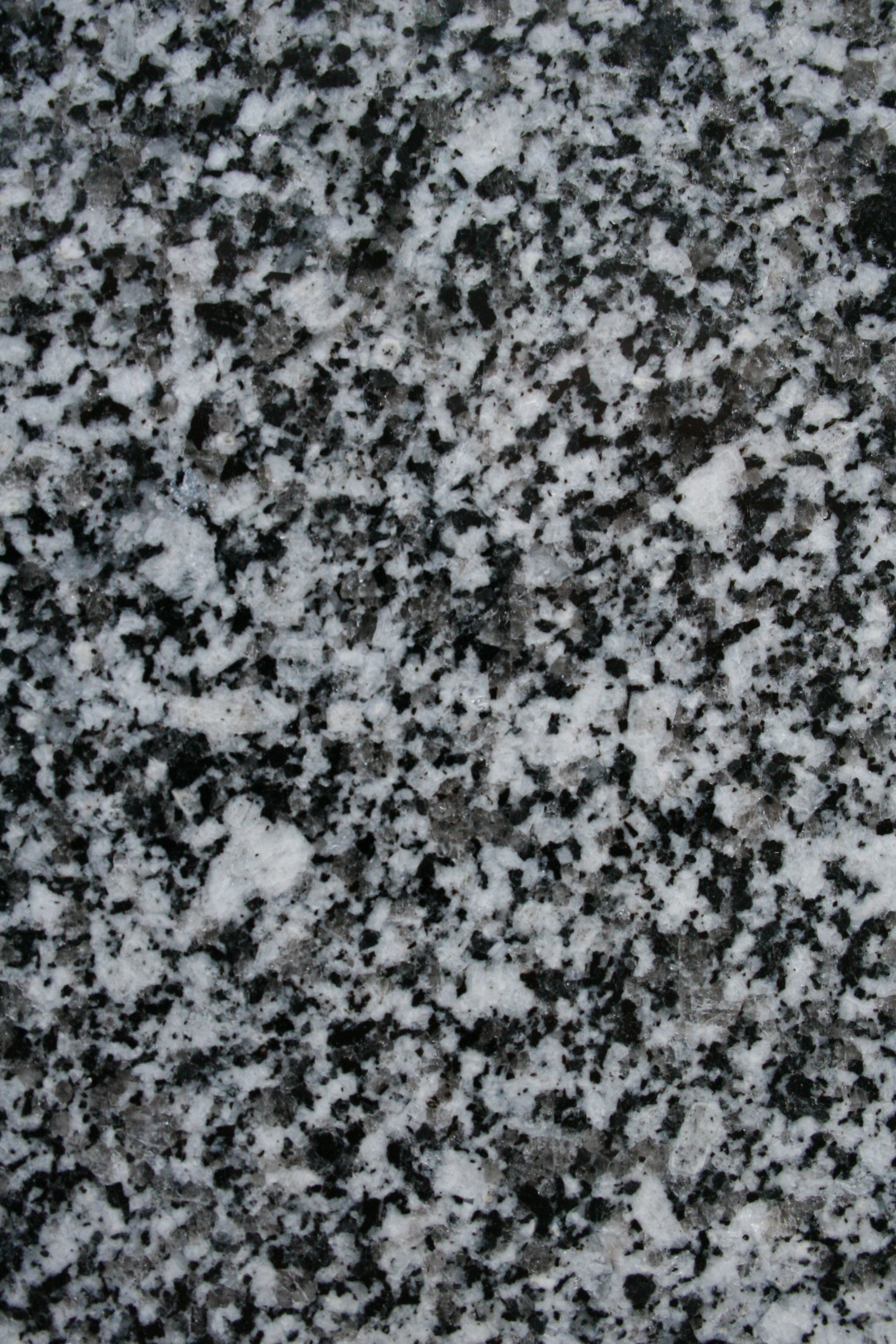 Lausitzer-Granodiorit, polierte Oberfläche Muster ca. 15 cm lang